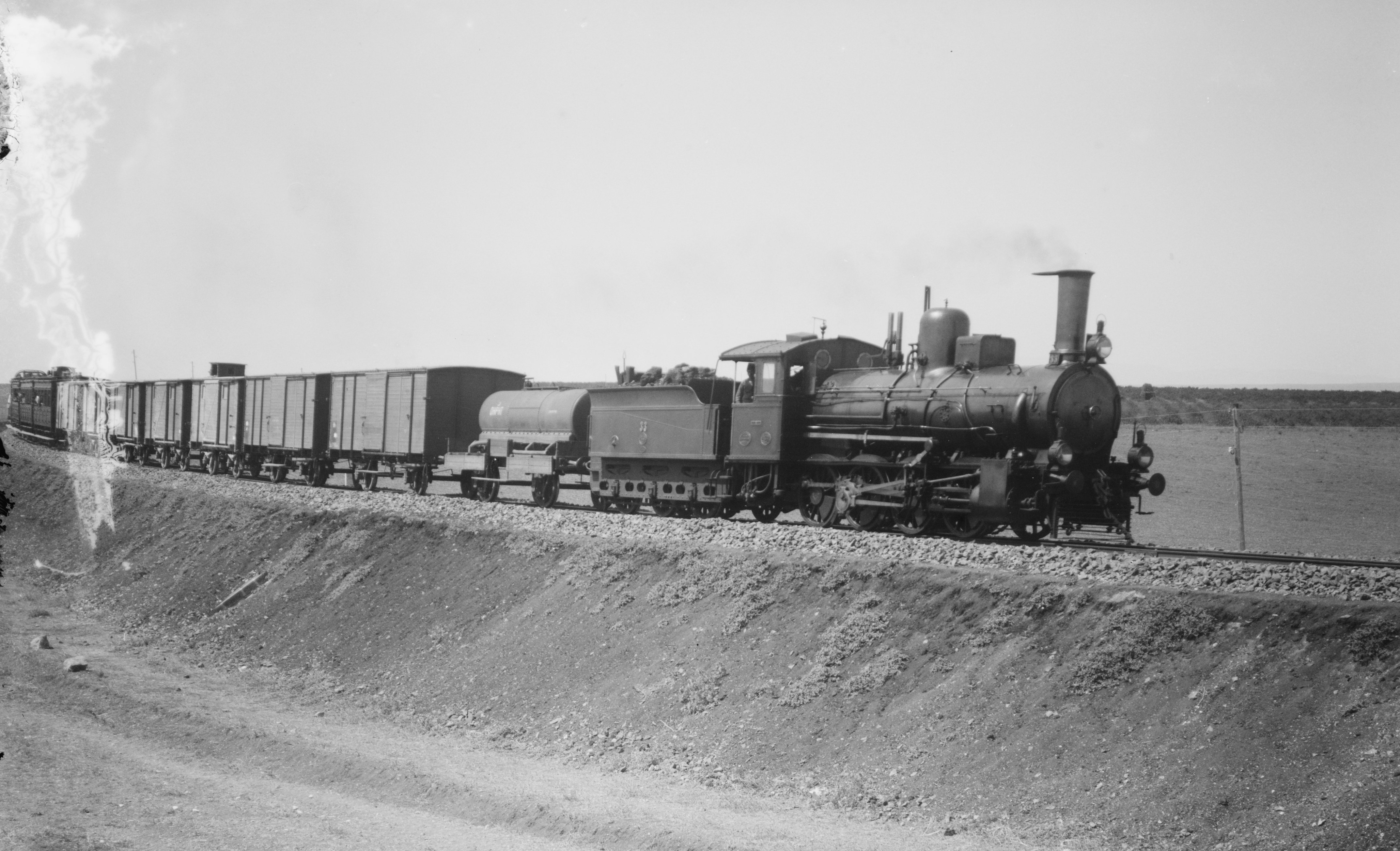 German Baghdad Railway.